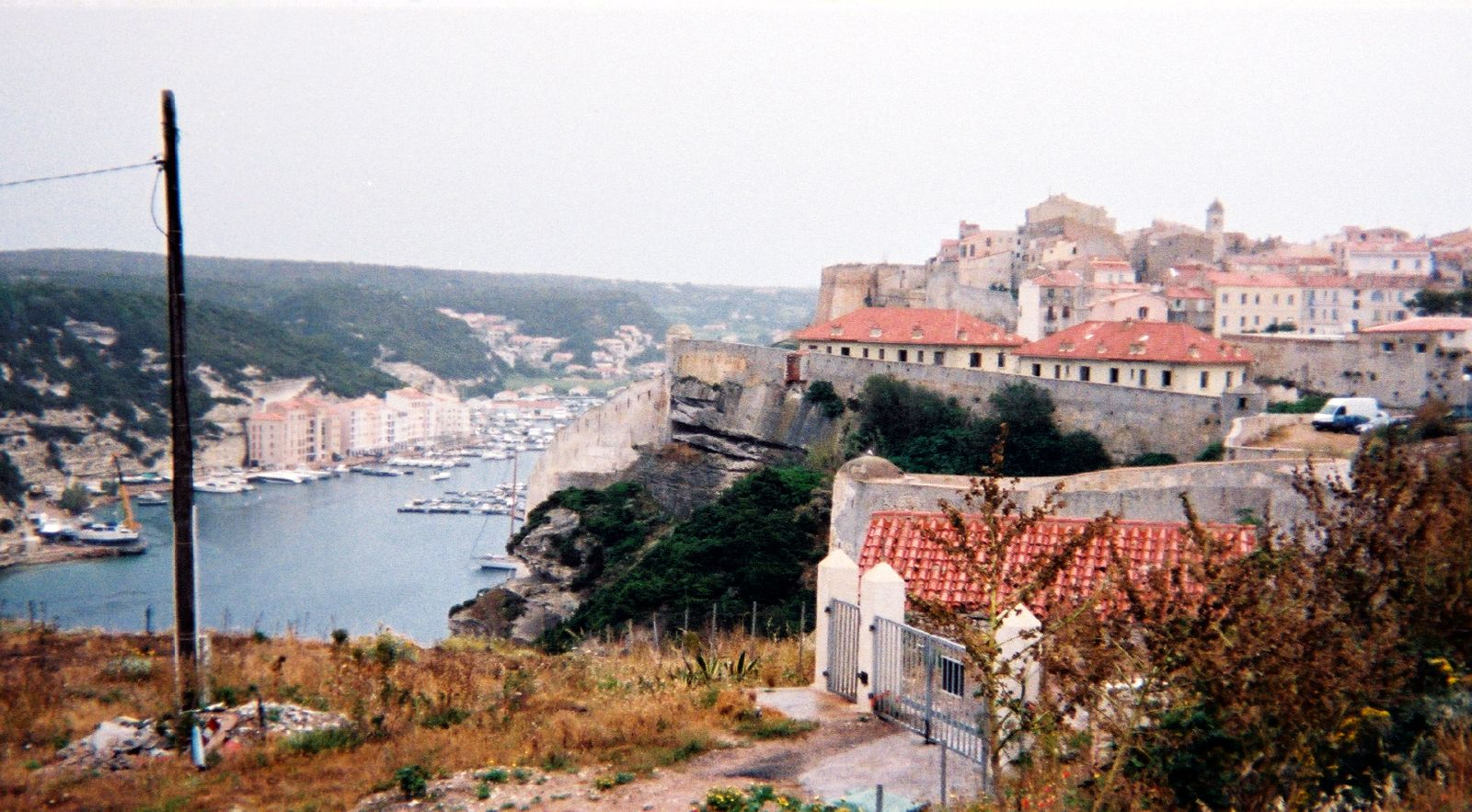 Bonifacio (Corse-du-Sud, France)